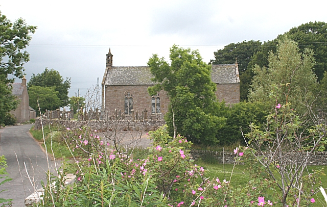 Aberlemno Kirk